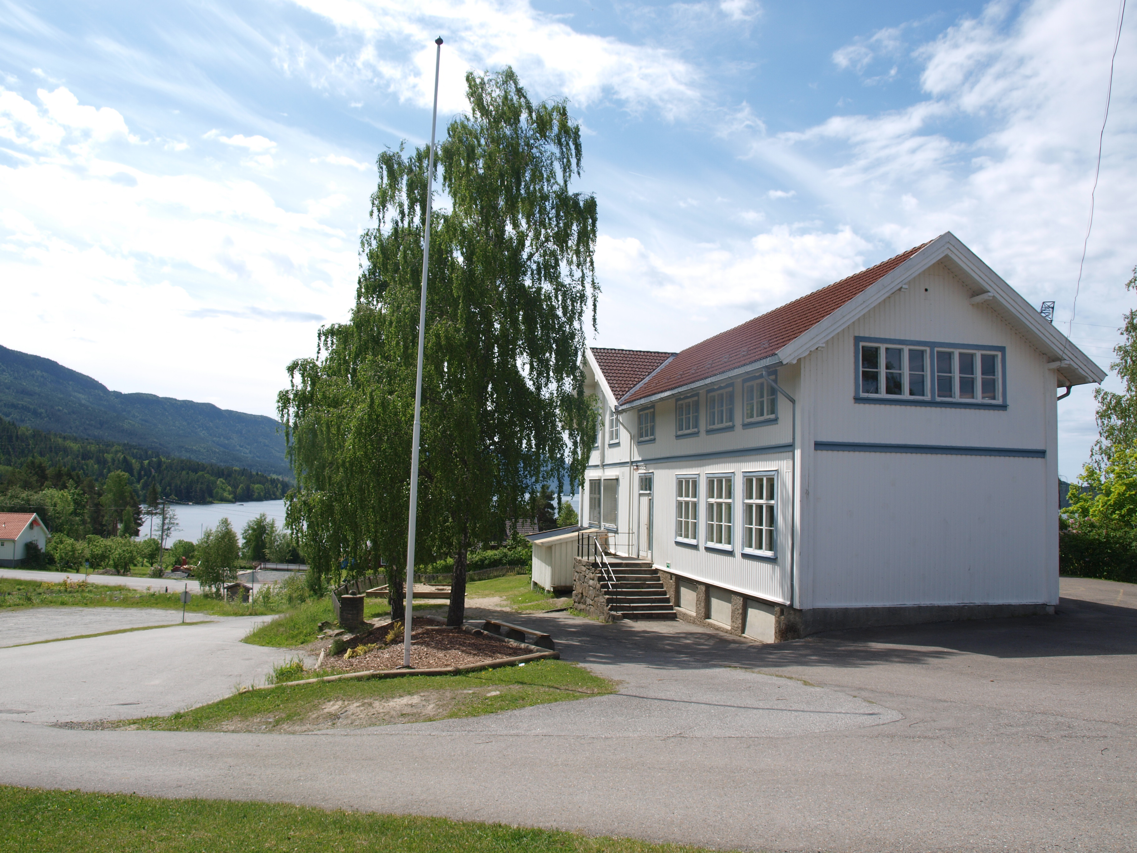 Vegård skole, som ligger i Åsa i Ringerike kommune i Buskerud.